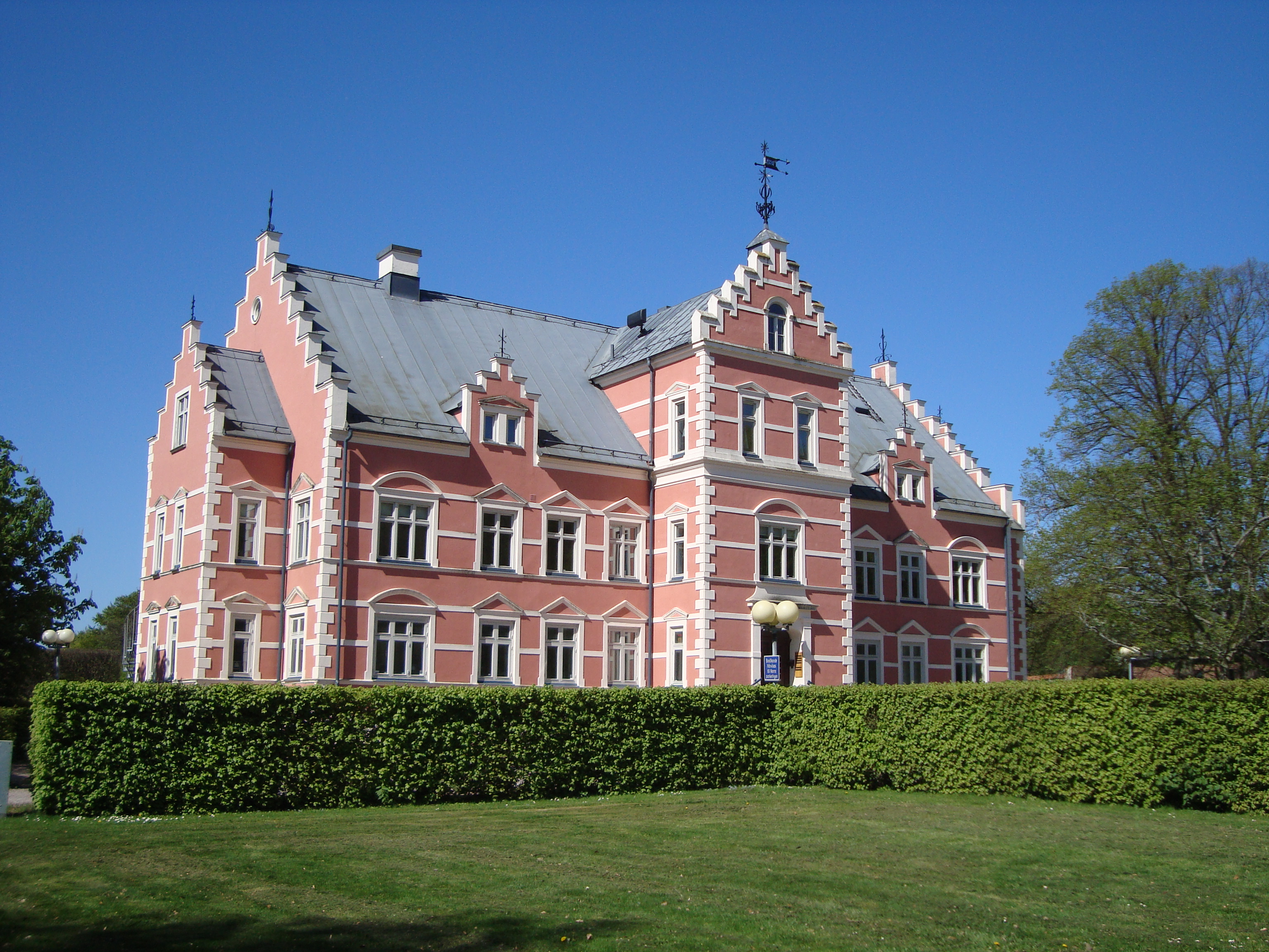 Pålsjö slott i Helsingborg.